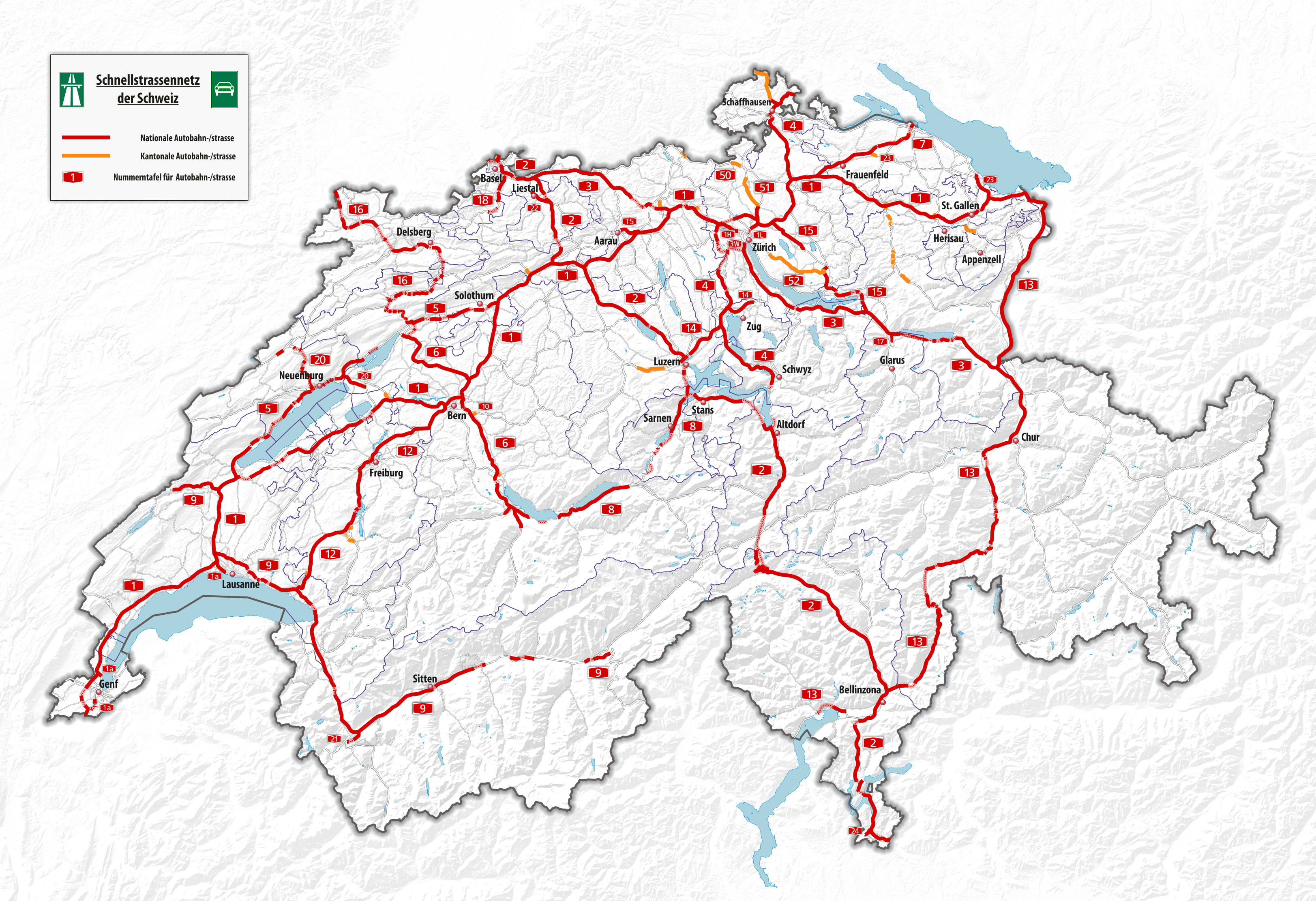 Schellstrassennetz der Schweiz Stand 2020